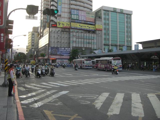 舊遠東公車站